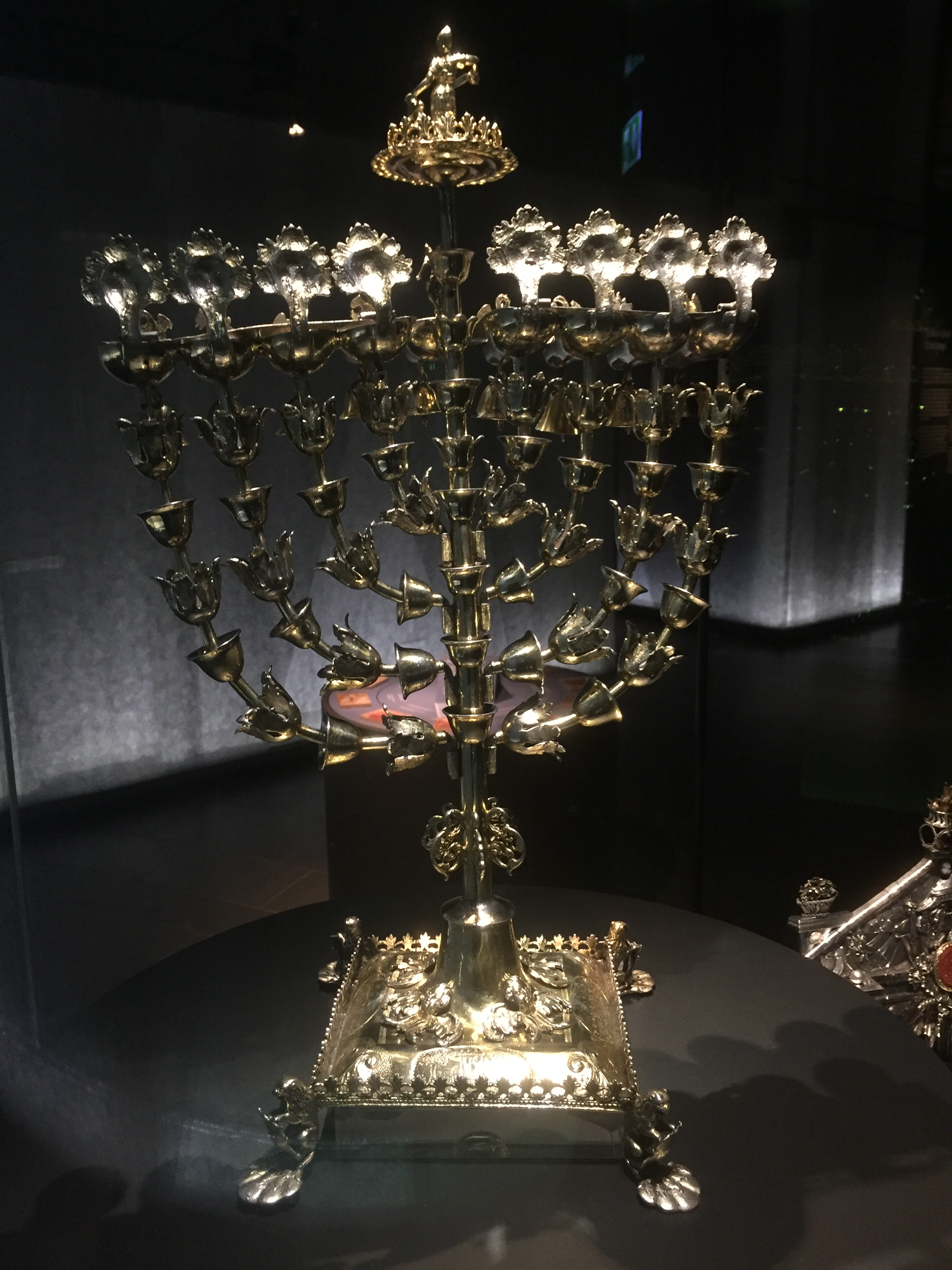 Standort: Museum Judengasse Frankfurt